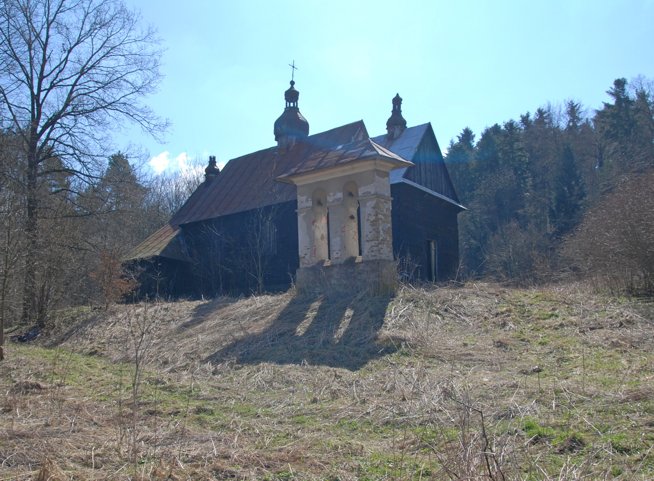 wieś Chyrzynka